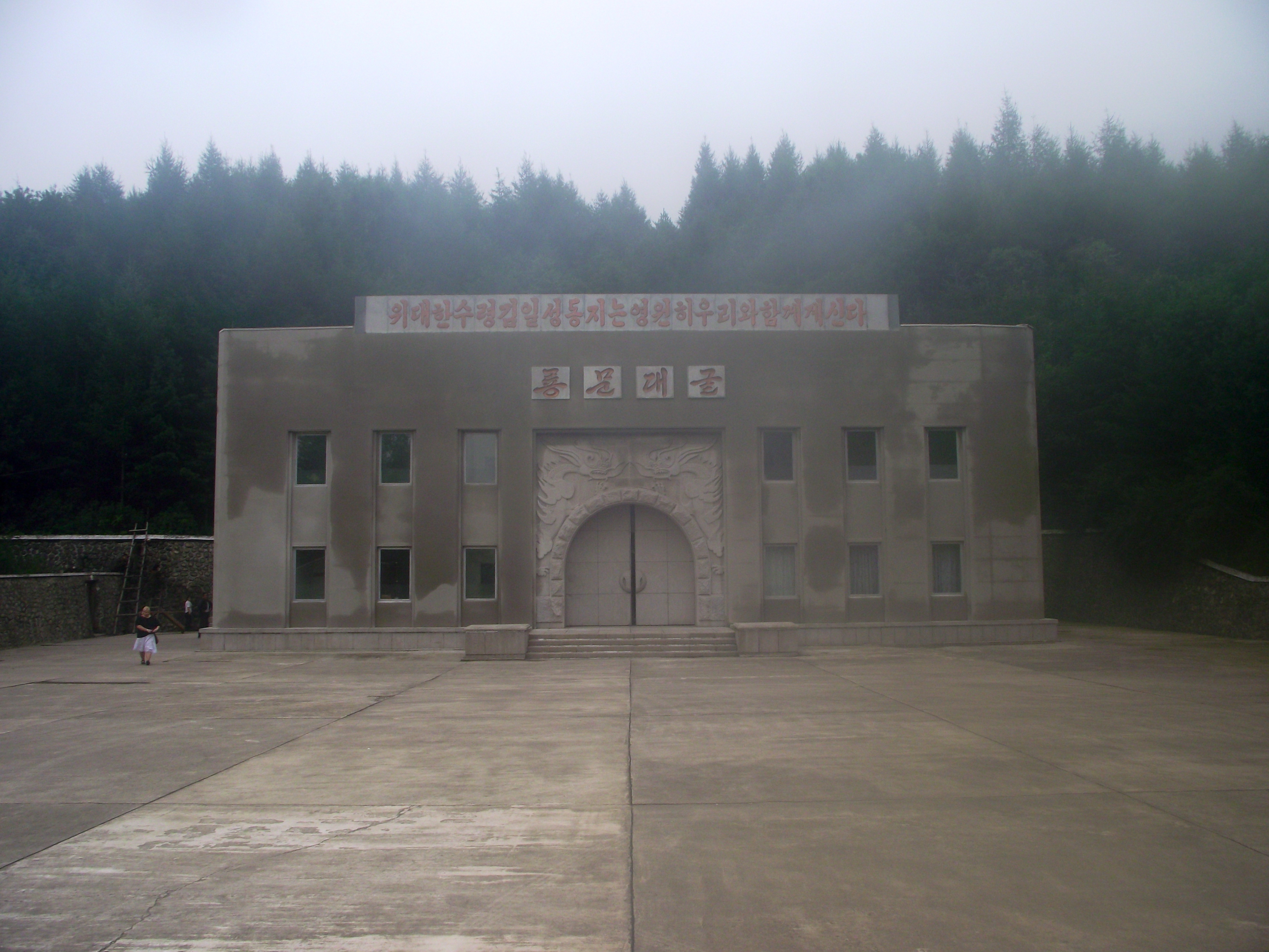 Ryongmun Caves entrance